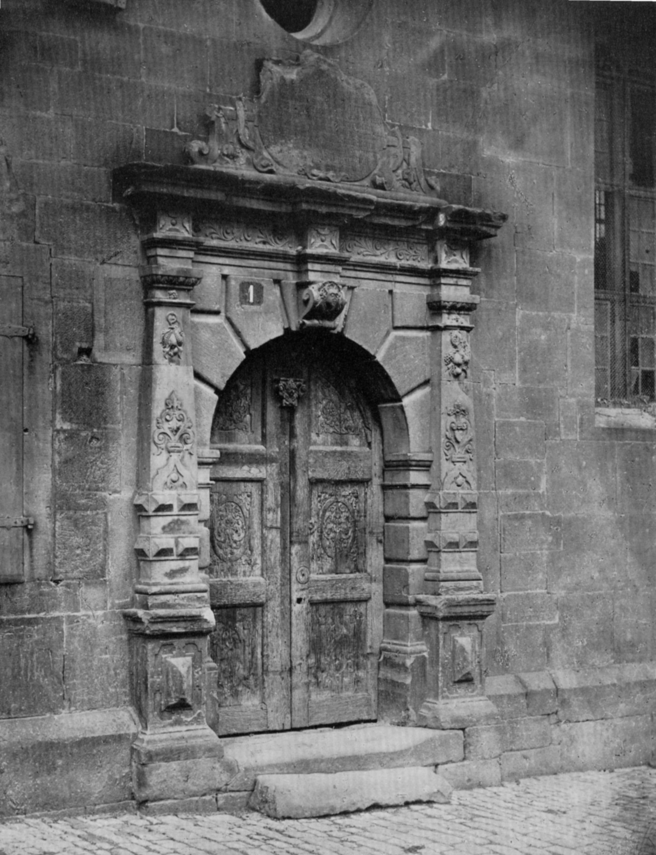 Das Südportal der Katharinenspitalkirche in Heilbronn 1865. Die Kirche gibt es seit 1870 nicht mehr.